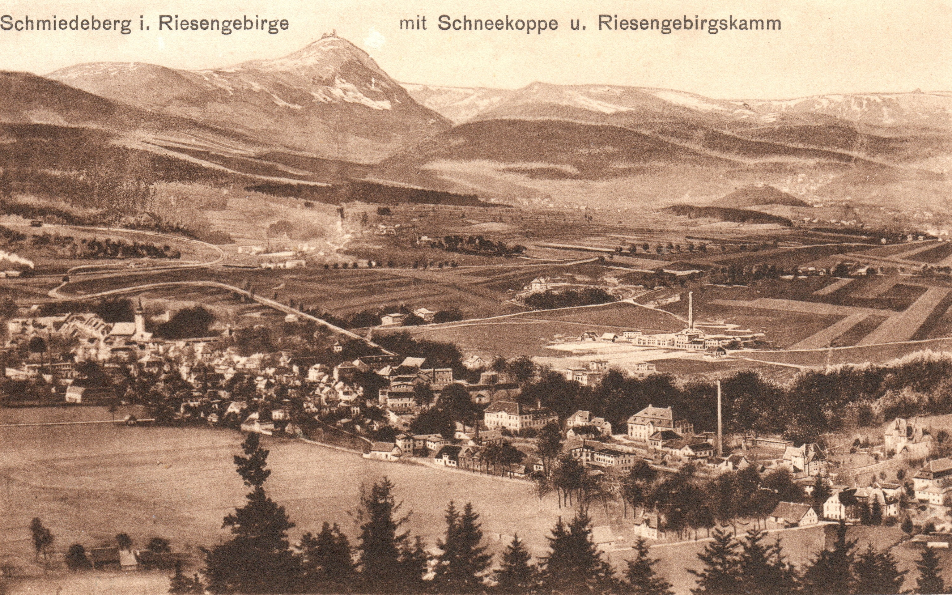 Schmiedeberg im Riesengebirge mit Schneekoppe und Riesengebirgskamm (Postkarte)